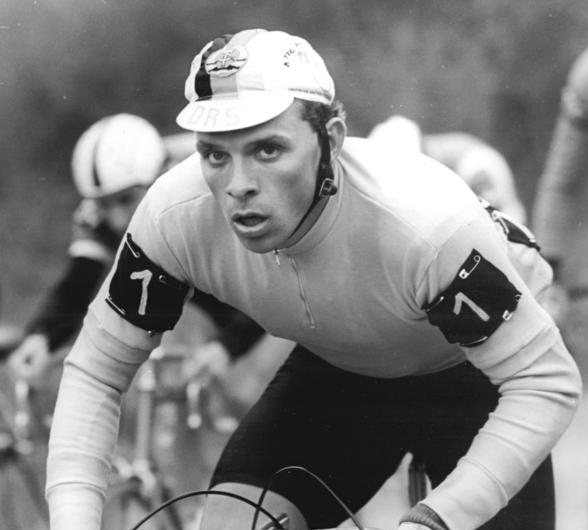 Uwe Ampler ADN-ZB Hirndorf 25.4.85 Bez. Erfurt: 11. Thüringen Radrundfahrt Etappe Rund um Buchenwald über 168km Der schon beim Prolog erfolgreiche Uwe Ampler vom SC DHfK Leipzig gewann auch die erste Etappe, die auf einem sieben mal zu durchfahrendendenausgetragen Rundkurs ausgetragen wurde, in 4:45,11 h. Der Freidensfahrt-Kandidat verteidigte damit das Gelbe Trikot.